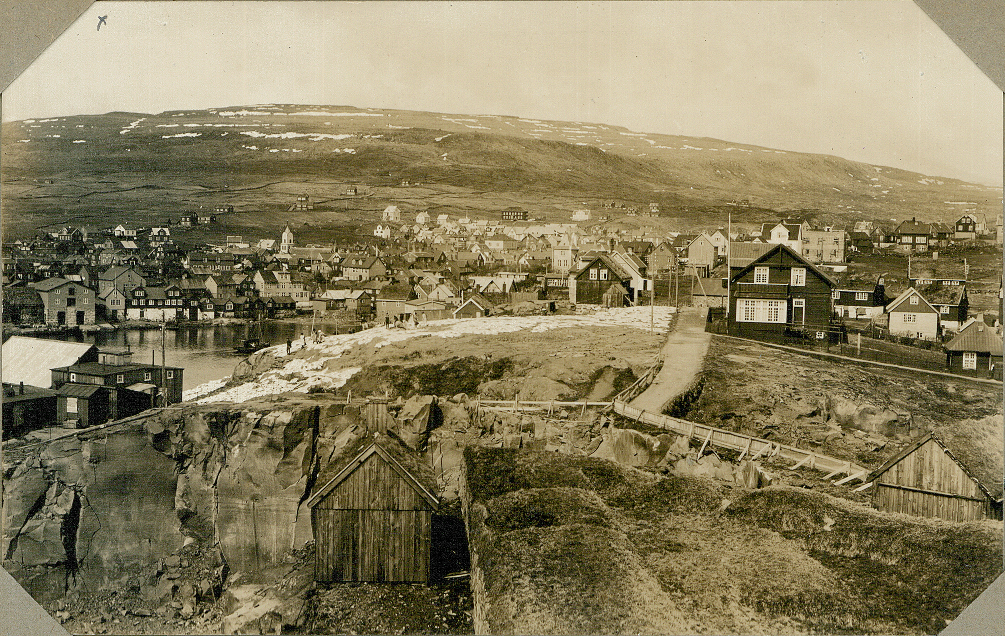 Fotografiet sidder i et fotoalbum lavet af Sophie Petersen med titlen "Færøerne". Fotoalbummet har nummer F5, og indgår i Det Kongelige Danske Geografiske Selskabs arkiv som af resultat af samarbejde mellem Etnografisk Samling og selskabet siden 2010 har været opstillet på Nationalmuseet som et selvstændigt arkiv. Arkivet er administreret af Etnografisk Samling. Det Kongelige Danske Geografiske Selskab har eksisteret siden det blev grundlagt 18. november 1876. Dets formål var at medvirke til “så vel at fremme kendskabet til jorden og dens beboere som at udbrede interessen for den geografiske videnskab” I arkivet findes blandt andet breve, dagbøger, regnskaber, kort og foredragsmanuskripter. Derudover indeholder arkivet over 70.000 fotografier.